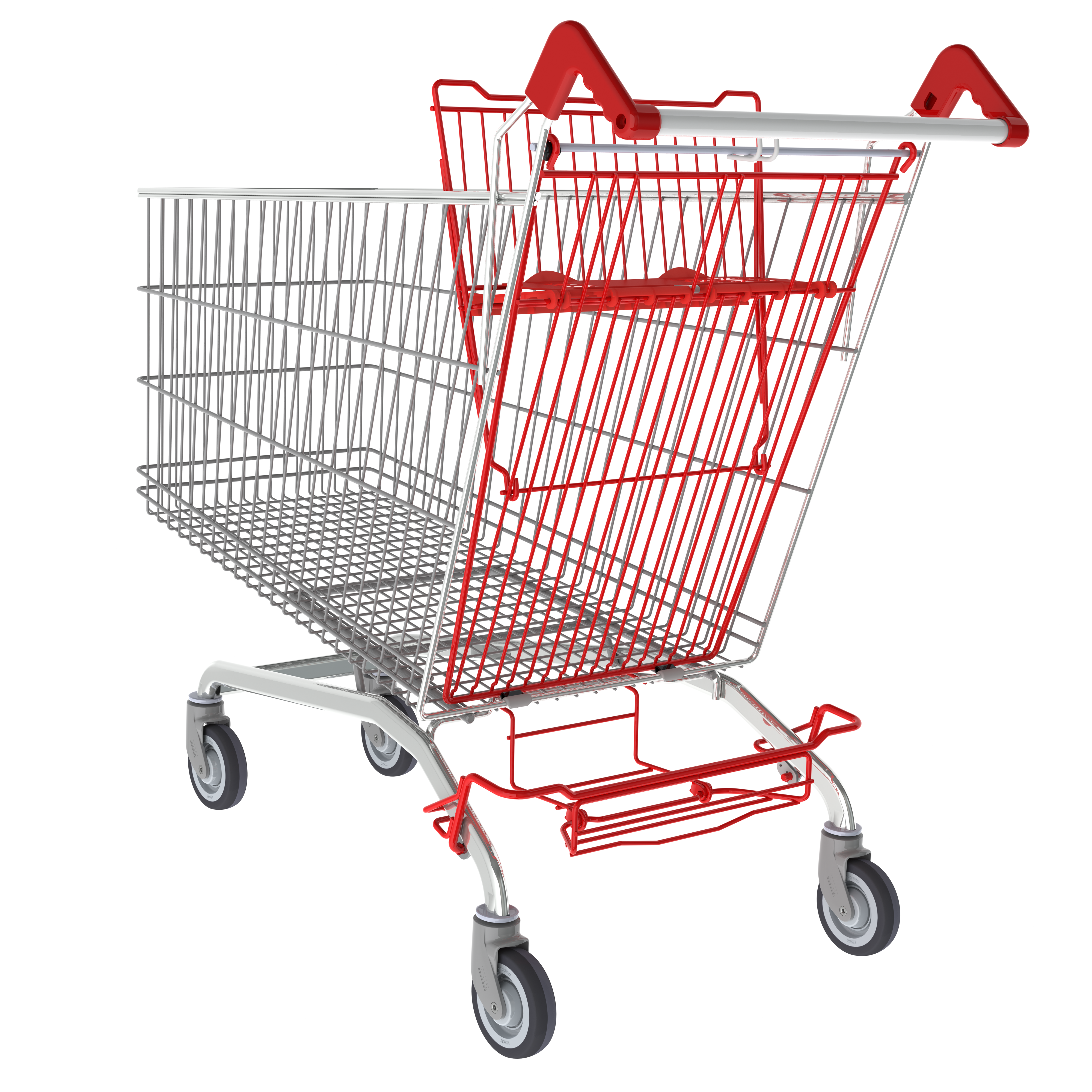 Chariot de libre service ERGODRIVE